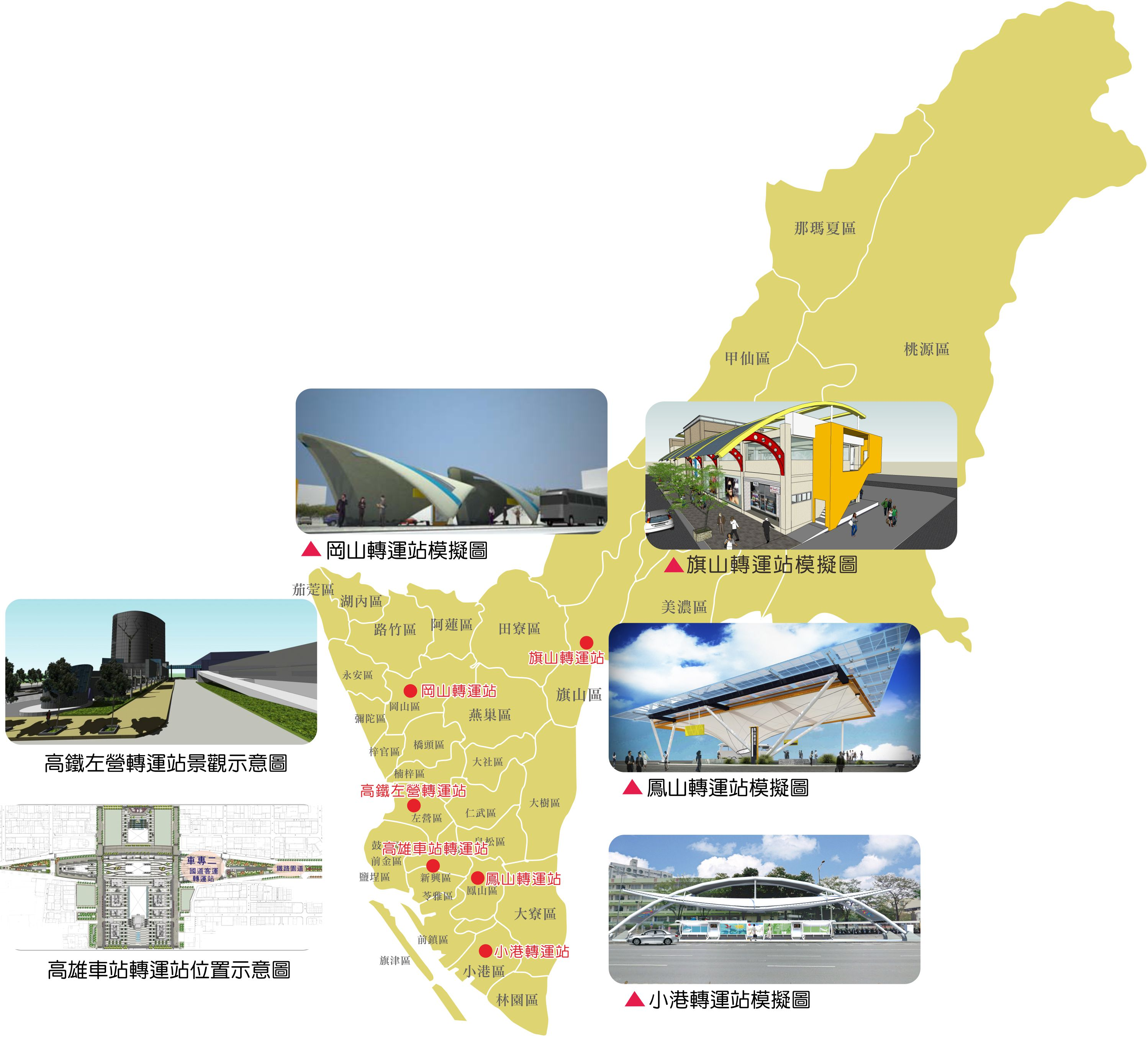 高雄市六大轉運站位置圖